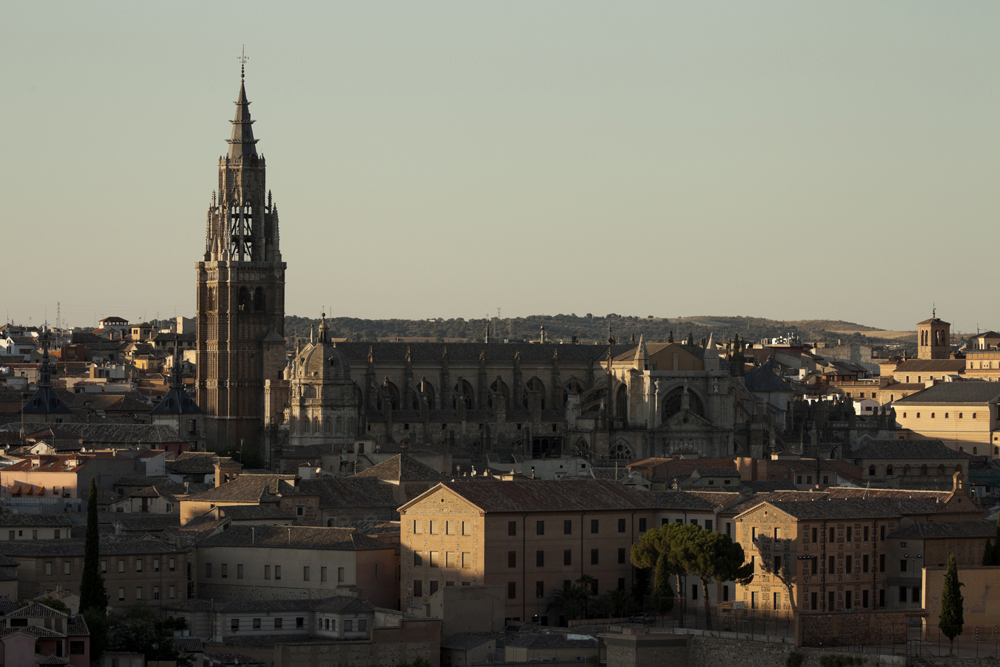 Cultural Heritage Spain RI-51-0000097